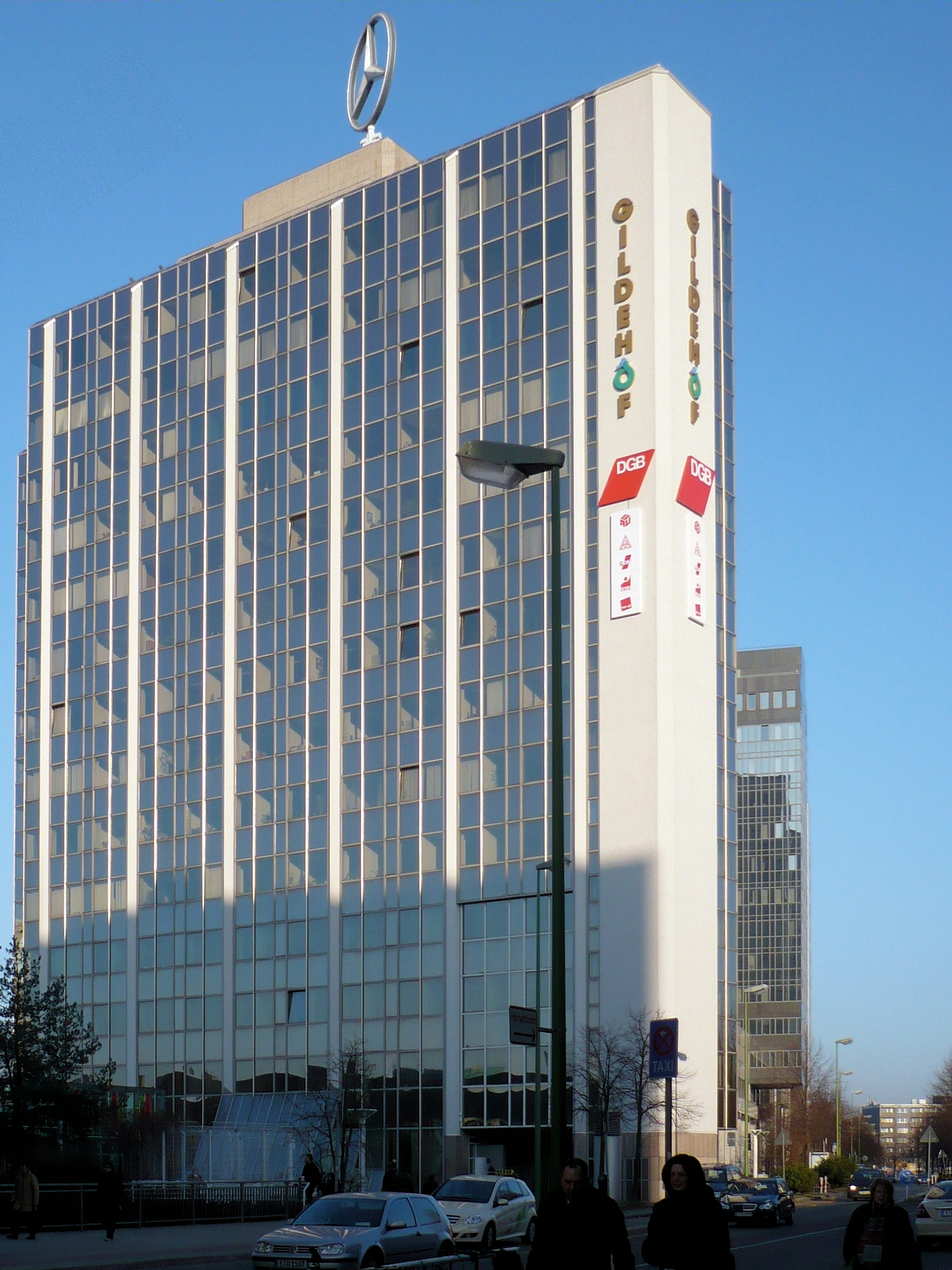 Hochhaus Gildehofcenter in Essen-Mitte